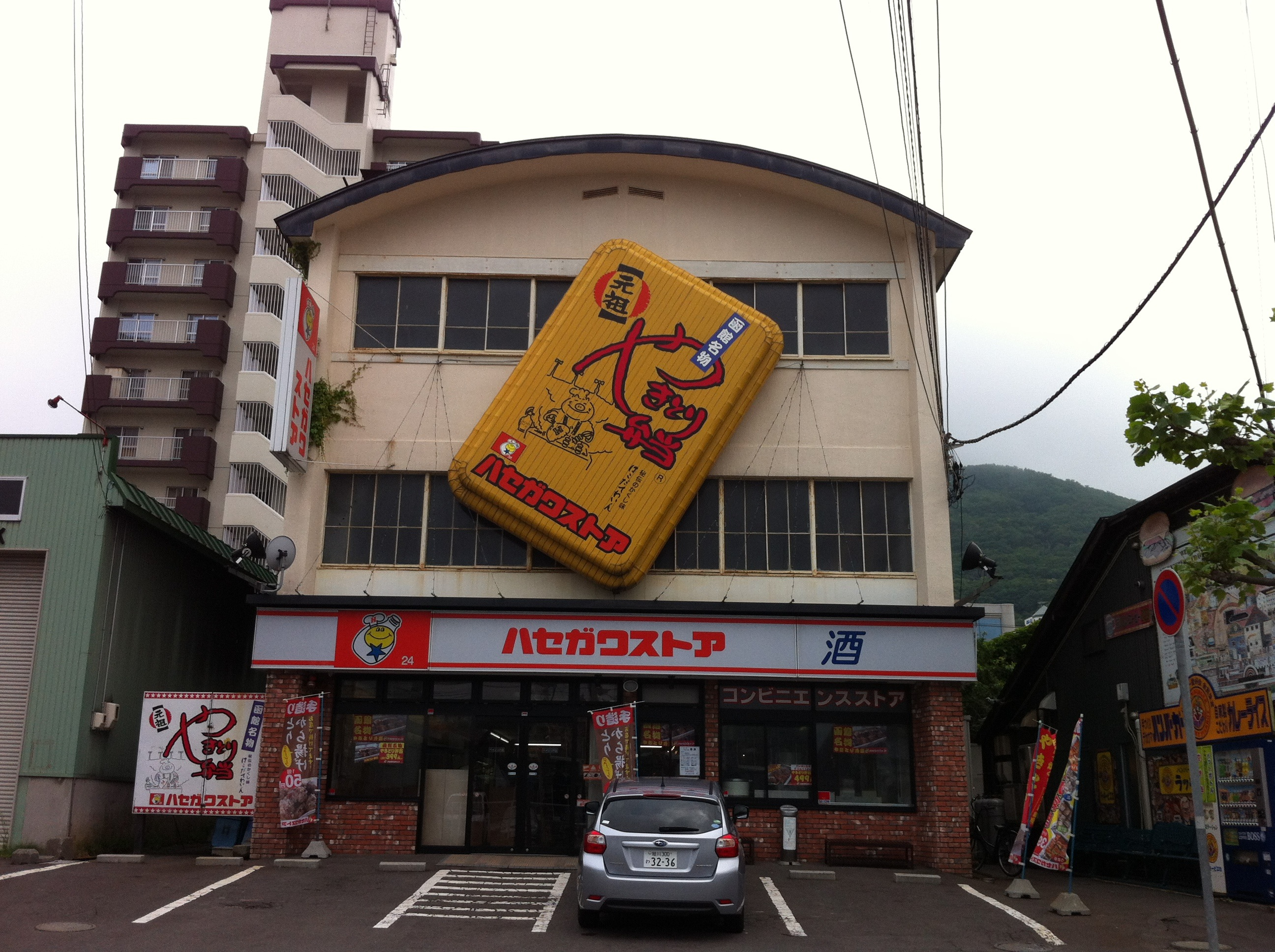 Célèbre conbini fastfood du sud de Hokkaido